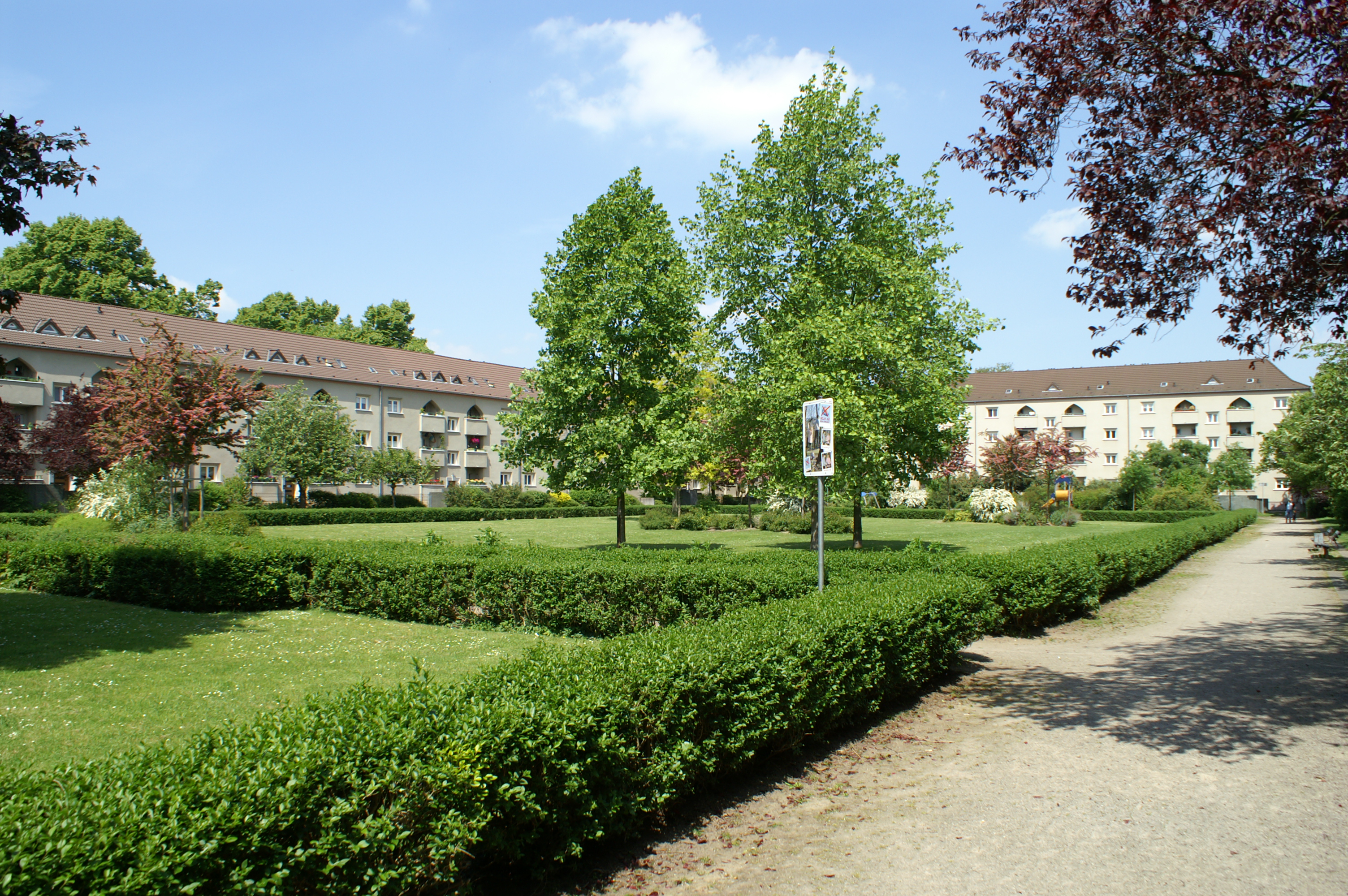 Hofwohnanlage Grüner Hof in Köln-Mauenheim